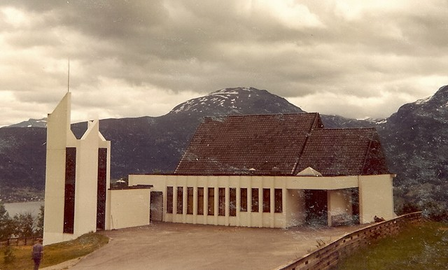 Nordsida kirke